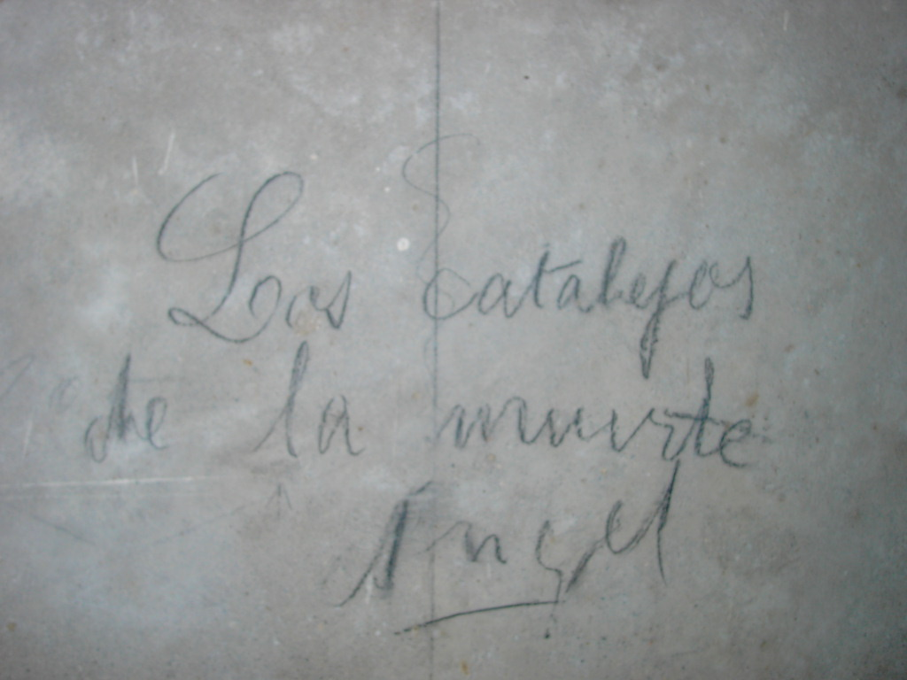 Refugios subterráneos de Almería (construidos durante la Guerra Civil Española) visitados antes de su restauración.